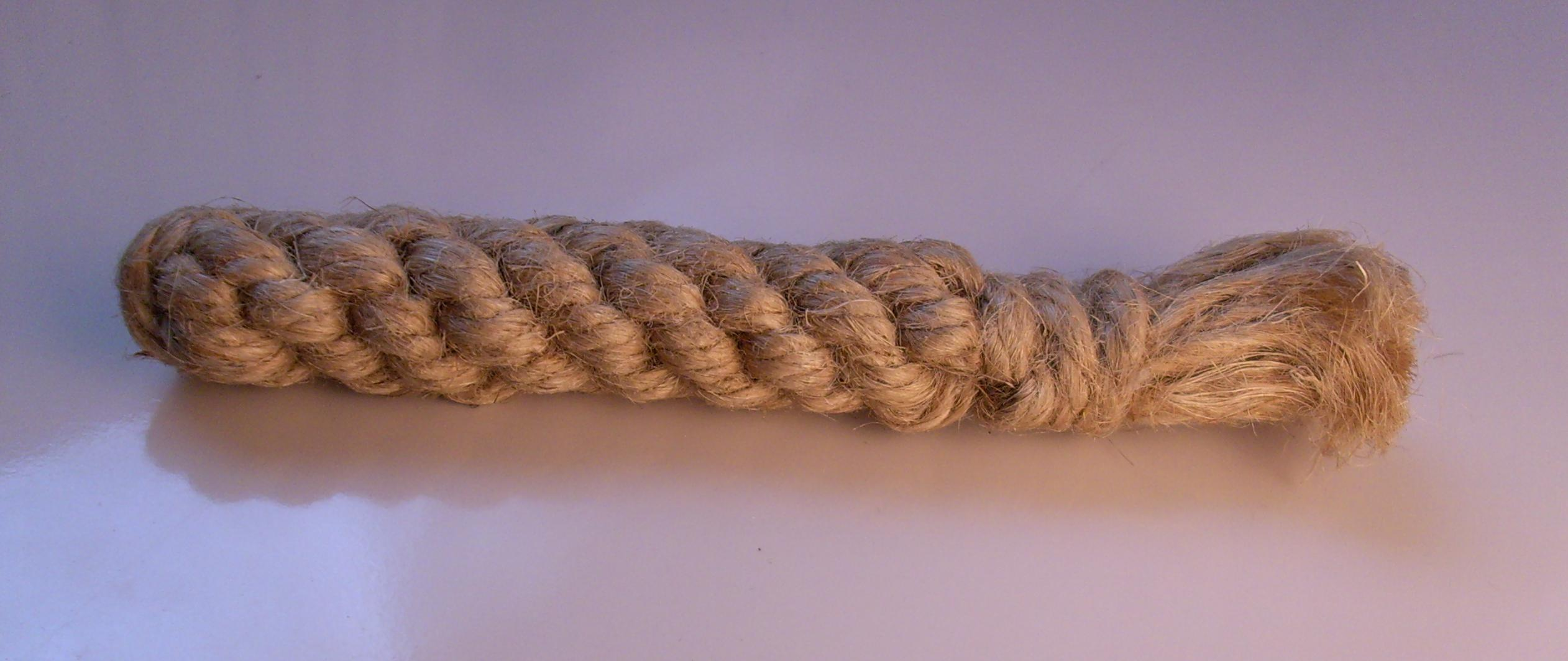 Endspleiß zur Verdickung am Seilende